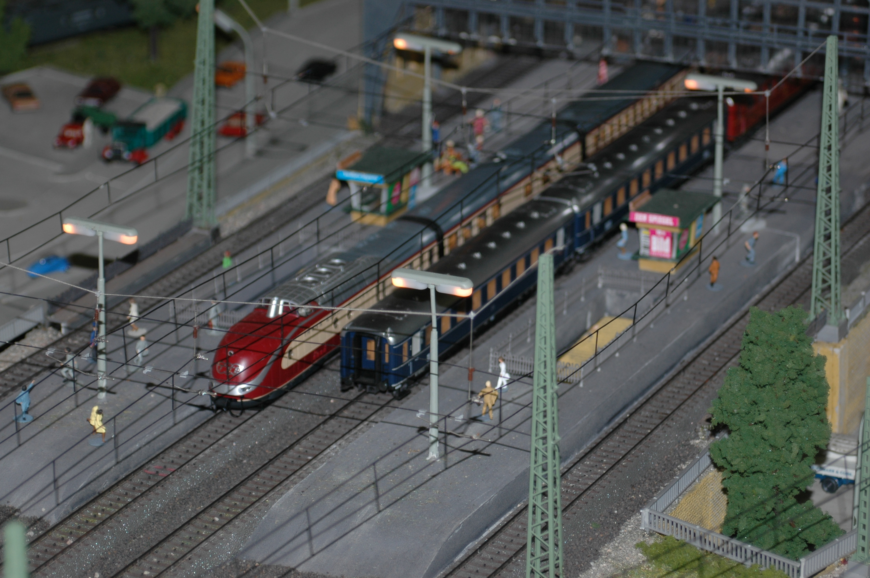 Modellbahnanlage im Märklin Museum, Göppingen, Spur H0